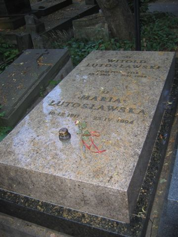 Witold Lutosławski's monument (Powązki Cemetery)